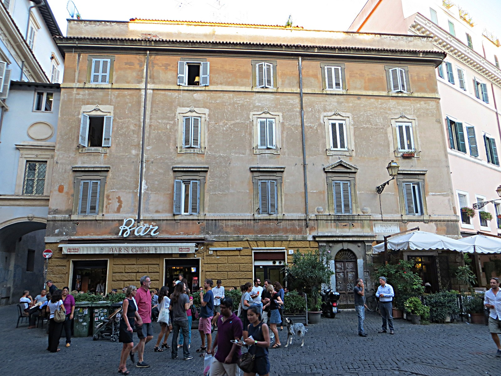 Piazza di S. Calisto